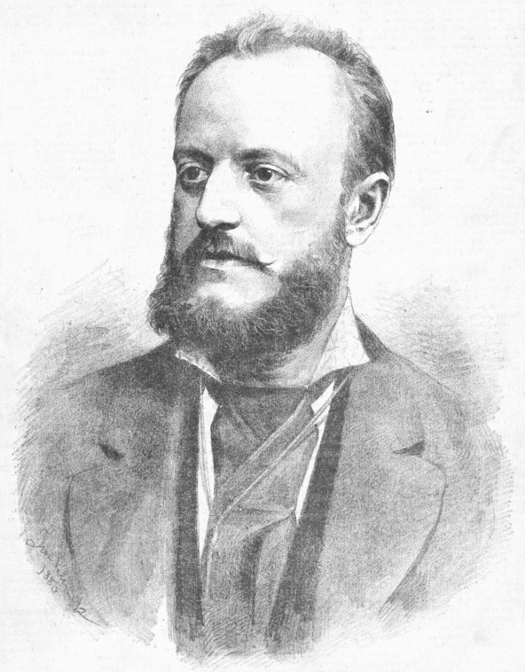 Portrét, nakreslený Janem Vilímkem pro Humoristické listy